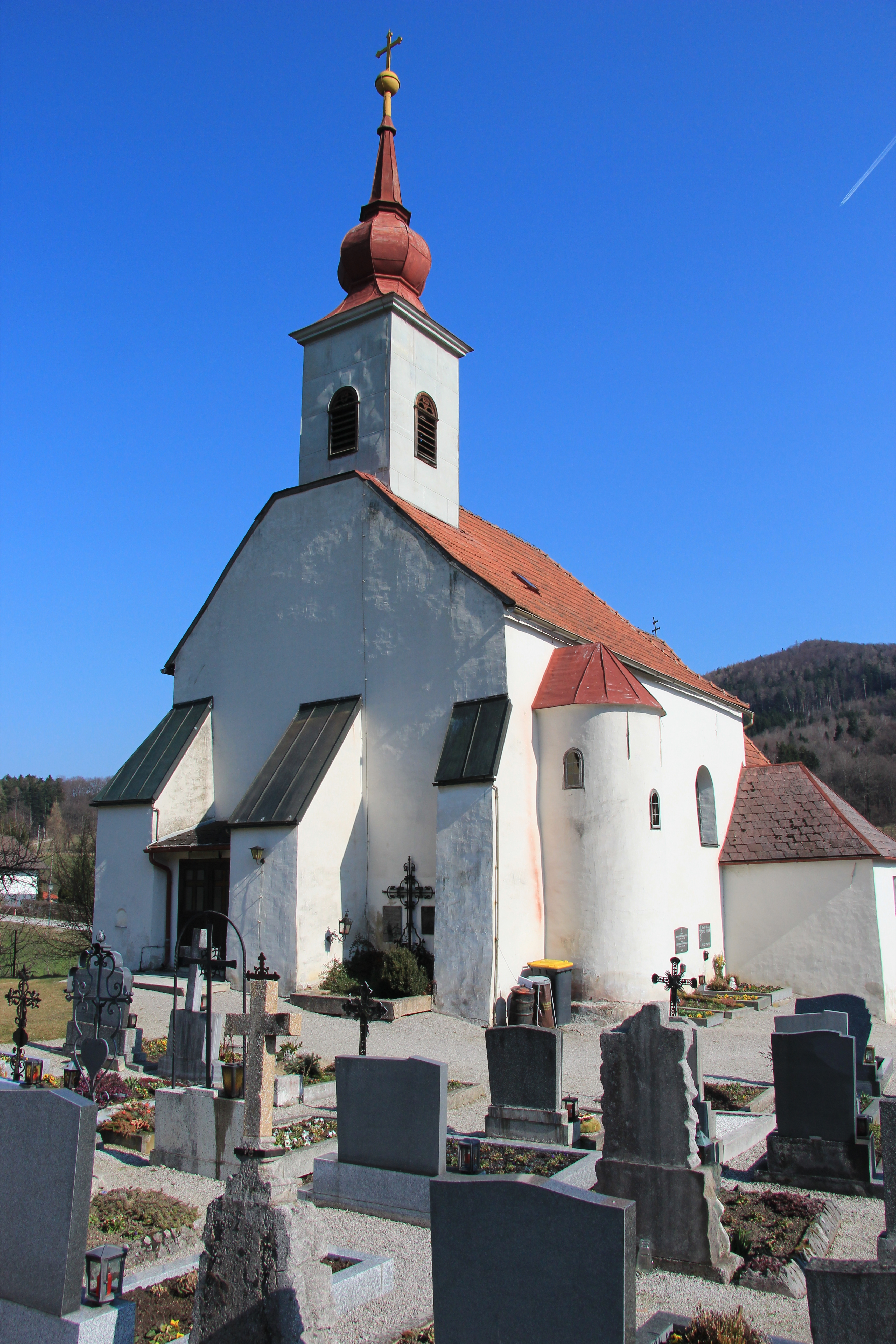 Kirche in Schwarzenbach, Gemeinde St. Veit an der Gölsen, Niederösterreich